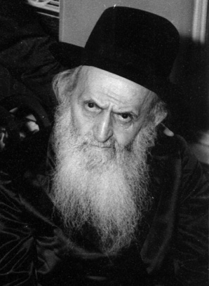 harav tosef eliyahu henkin